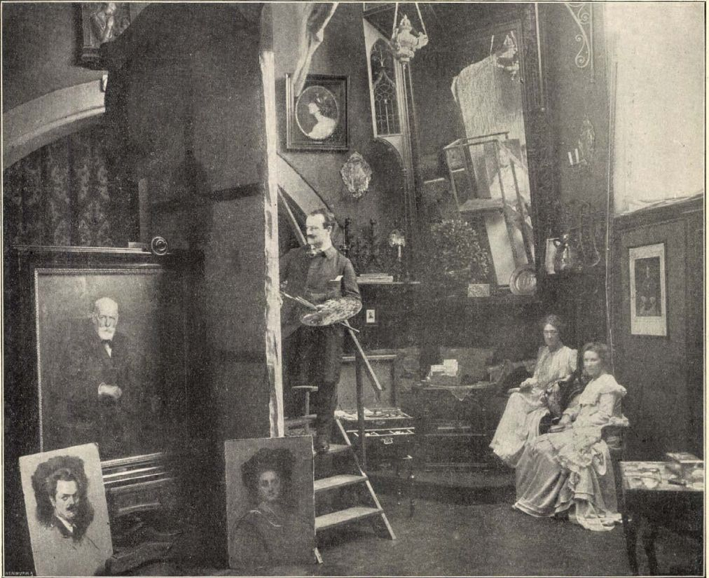 A Budapest, Zichy Géza utca 10. szám alatt található László-villa műterme